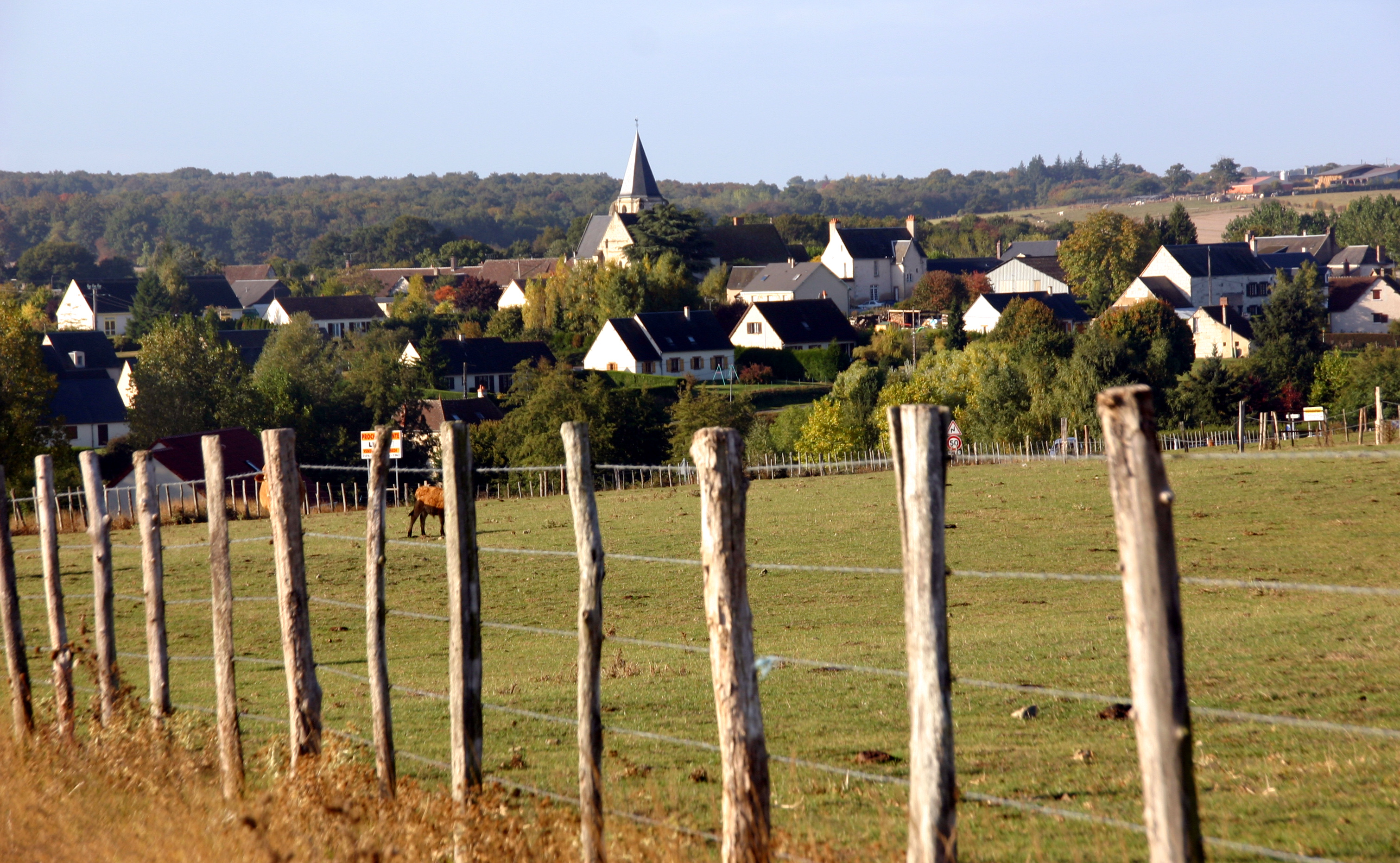 Saint-Martin-des-Bois